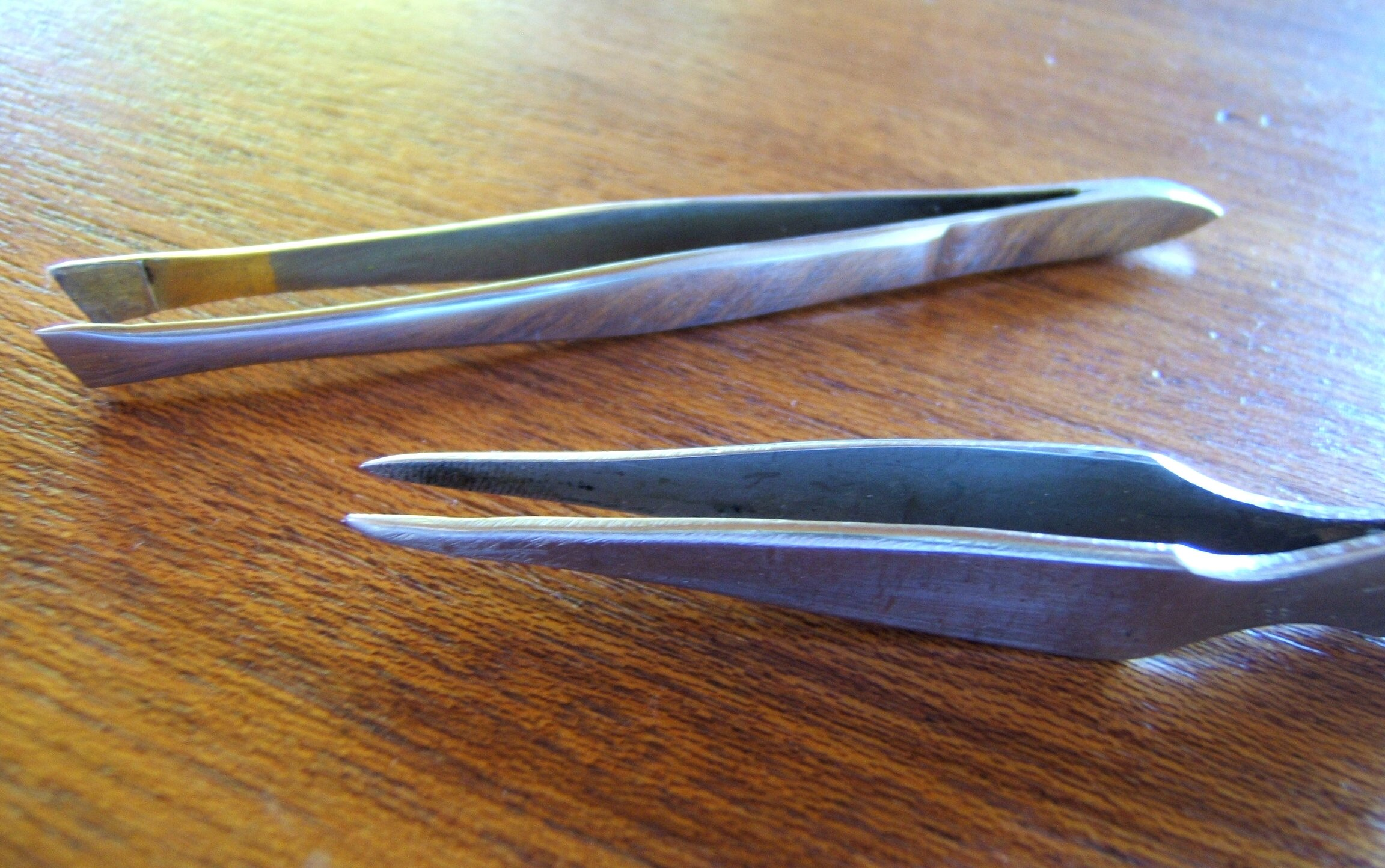 pincet